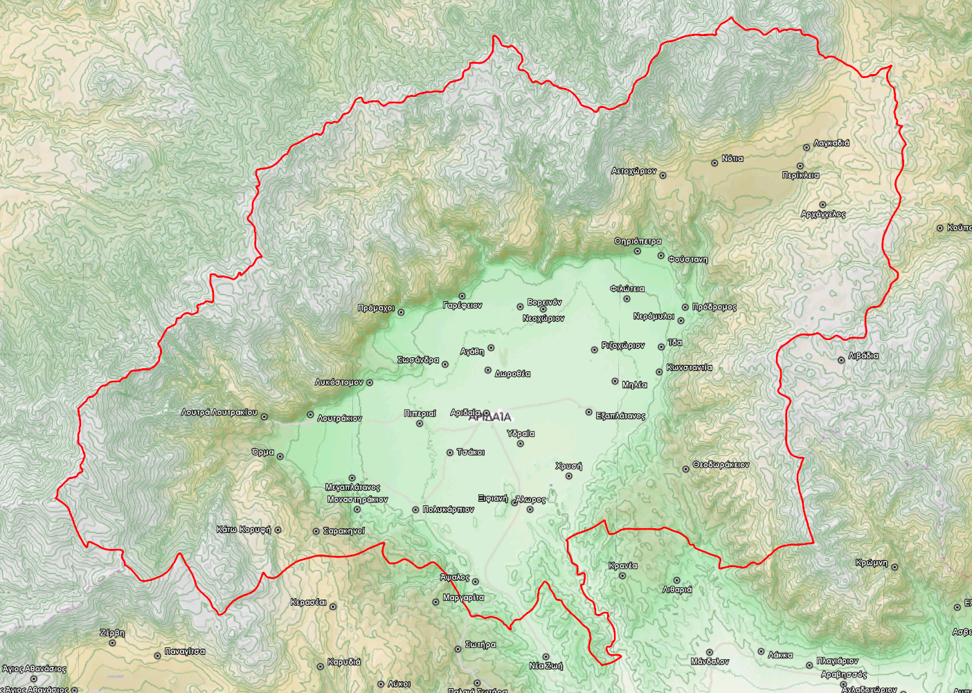 Τοπογραφικός χάρτης του Δήμου Αλμωπίας